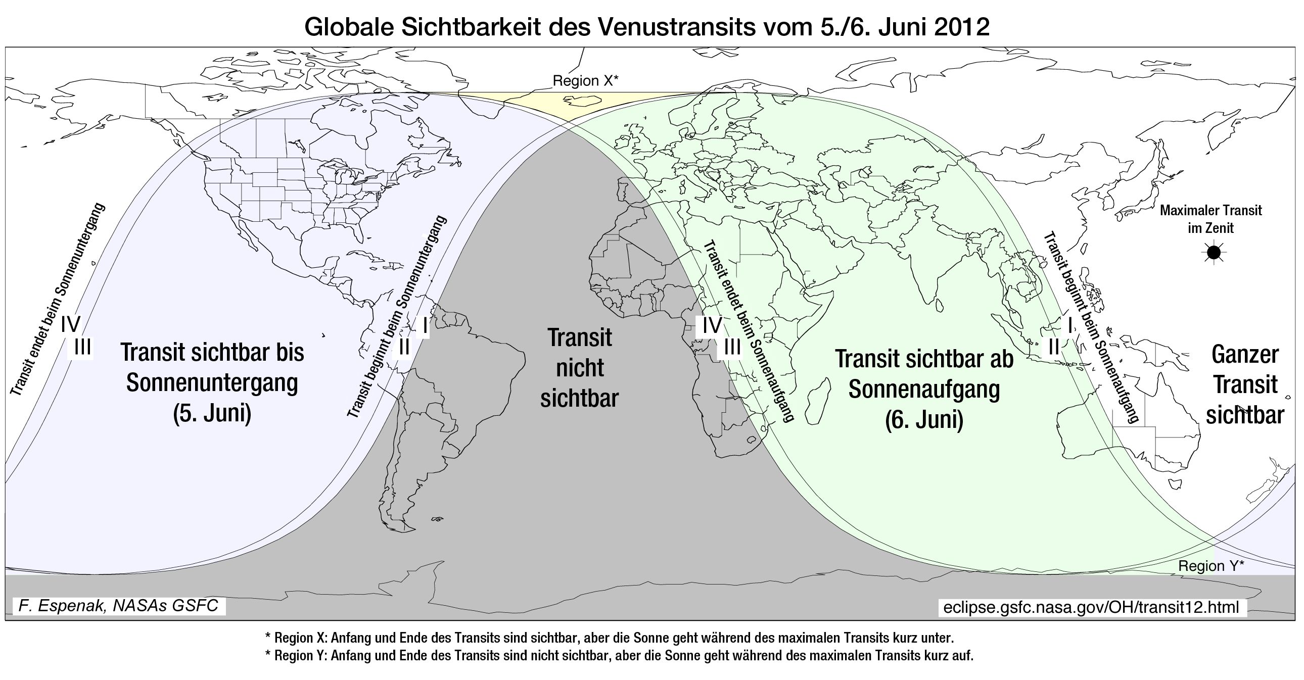 Karte der globalen Sichtbarkeit des Venustransits 2012, ins Deutsche übersetzt aus dem englischen Original.